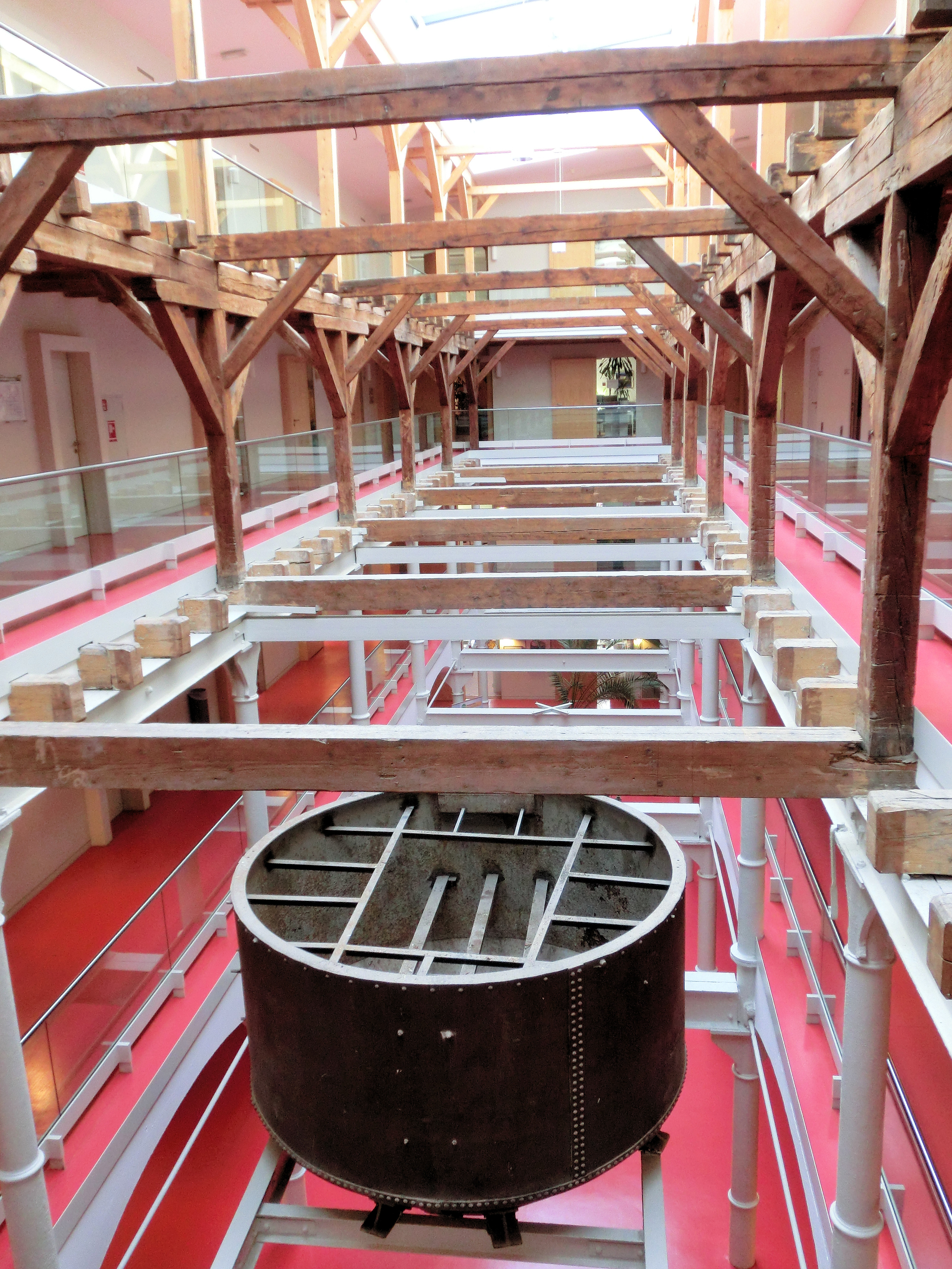 Grevesmühlen Alte Mälzerei innen